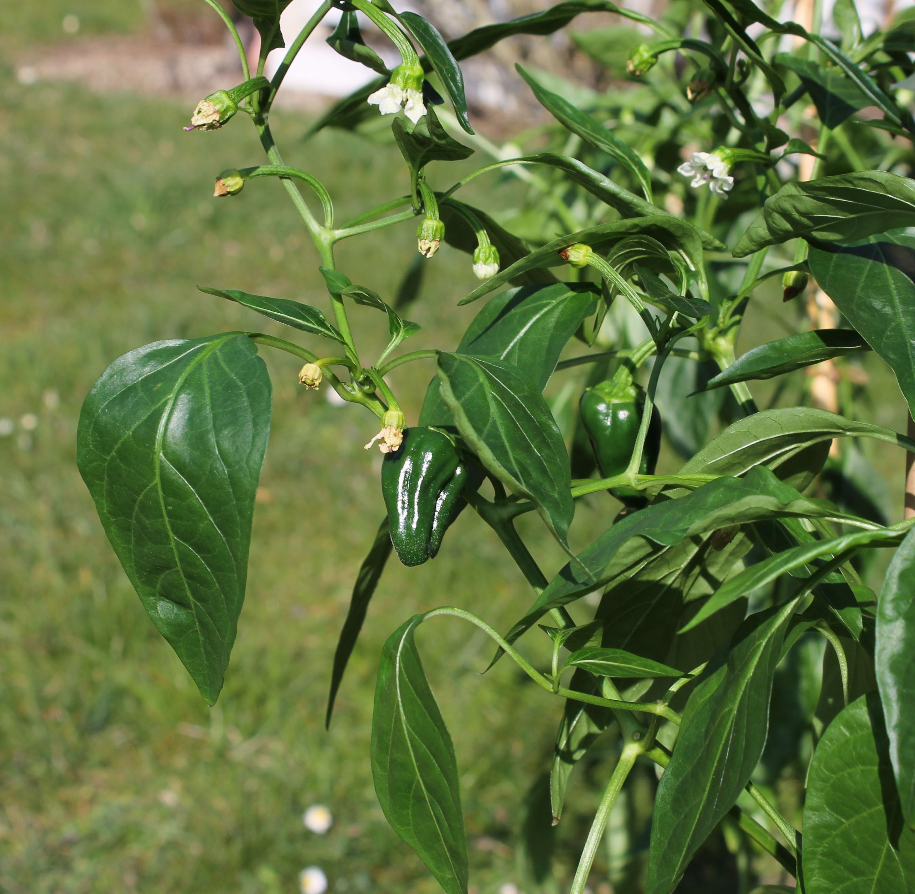 Pimientos de Padrón, Blüten und Schoten